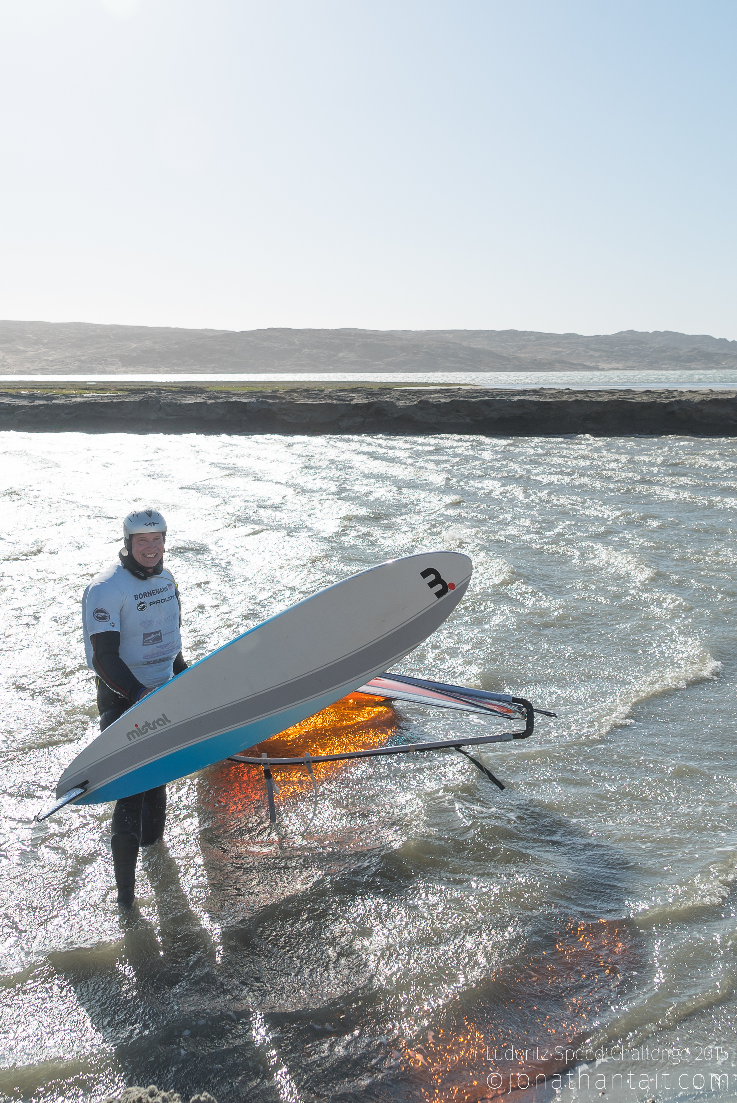 Christian Bornemann - vor dem Windsurfen